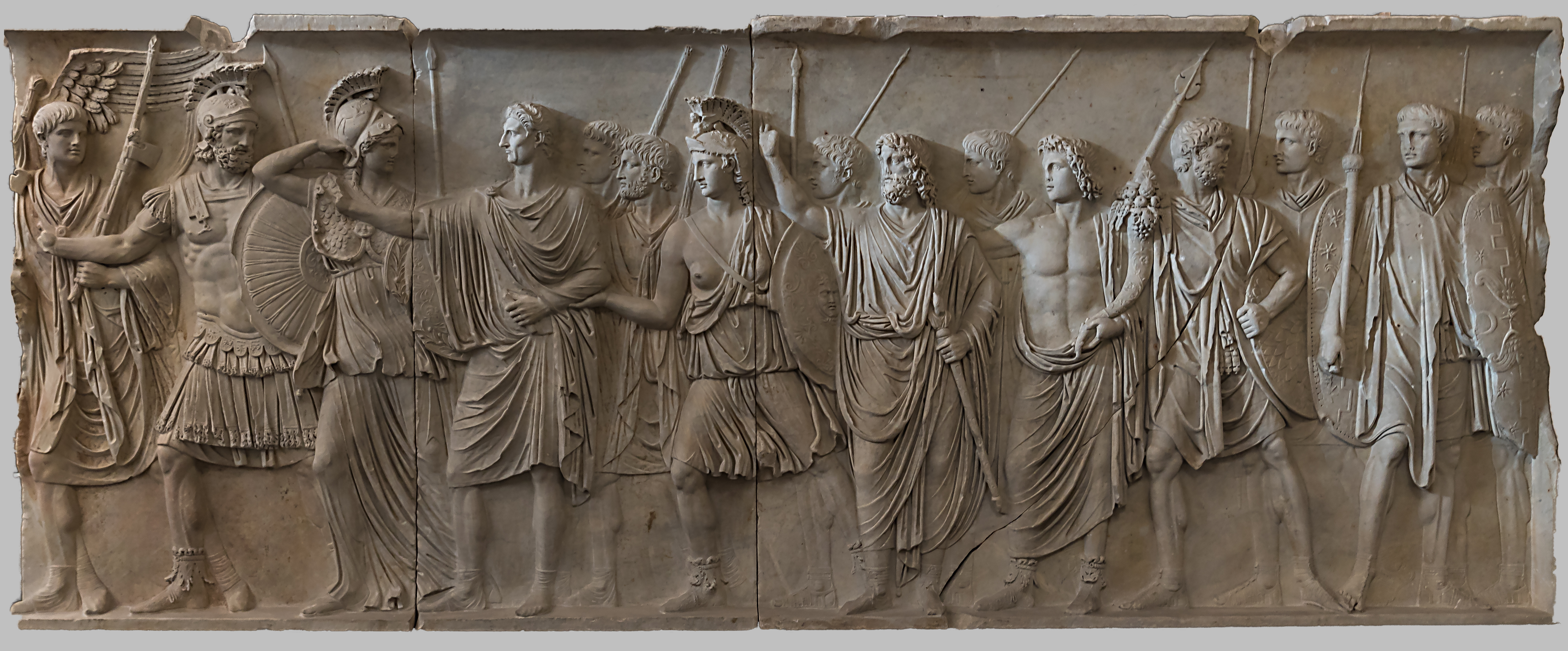 Cancelleria-Relief, Fries -A-, entdeckt zwischen 1937 und 1939 in Rom, unter dem Palazzo della Cancelleria Apostolica. Ausgestellt in den Vatikanischen Museen (Inv. 13389 -13391)